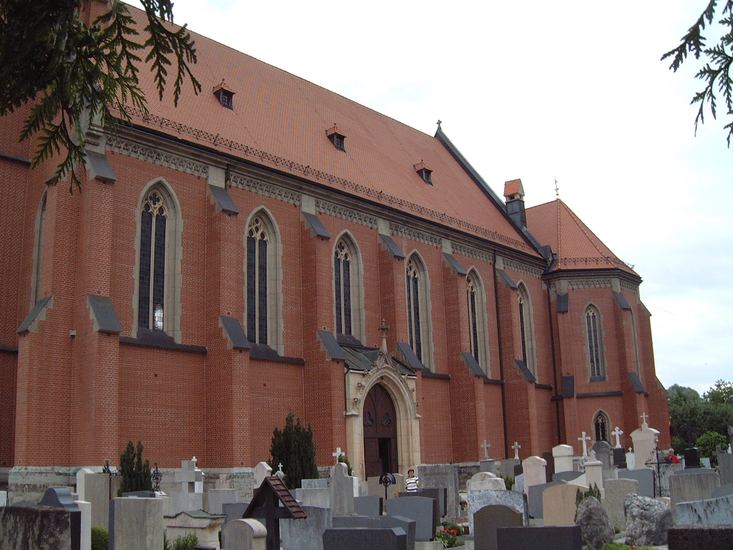 Pfarrkirche St. Nikolaus in Übersee am Chiemsee